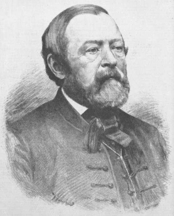 František August Brauner (1810 - 1880) - český právník a politik. Portrét, nakreslený Janem Vilímkem pro Humoristické listy